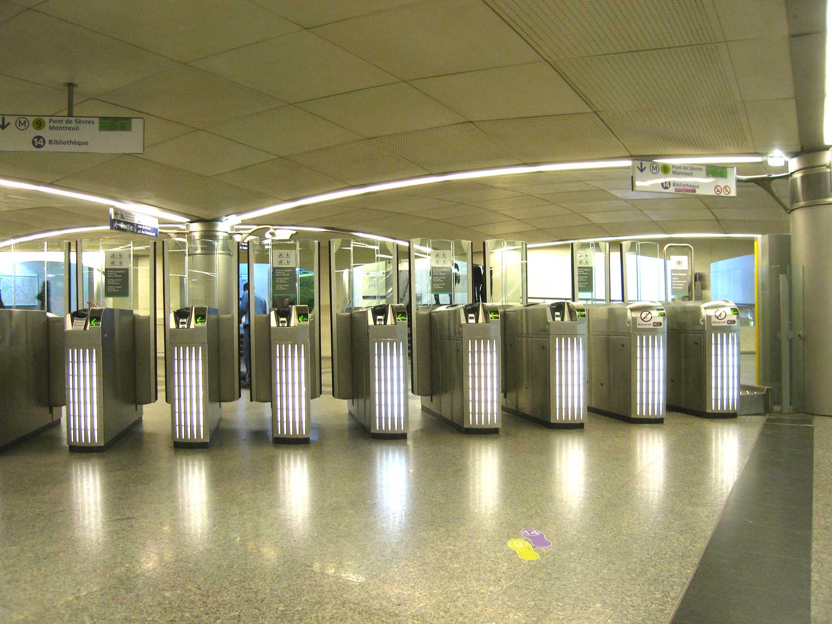 Métro de Paris, Salle d'échanges gare Saint Lazare, Paris, France